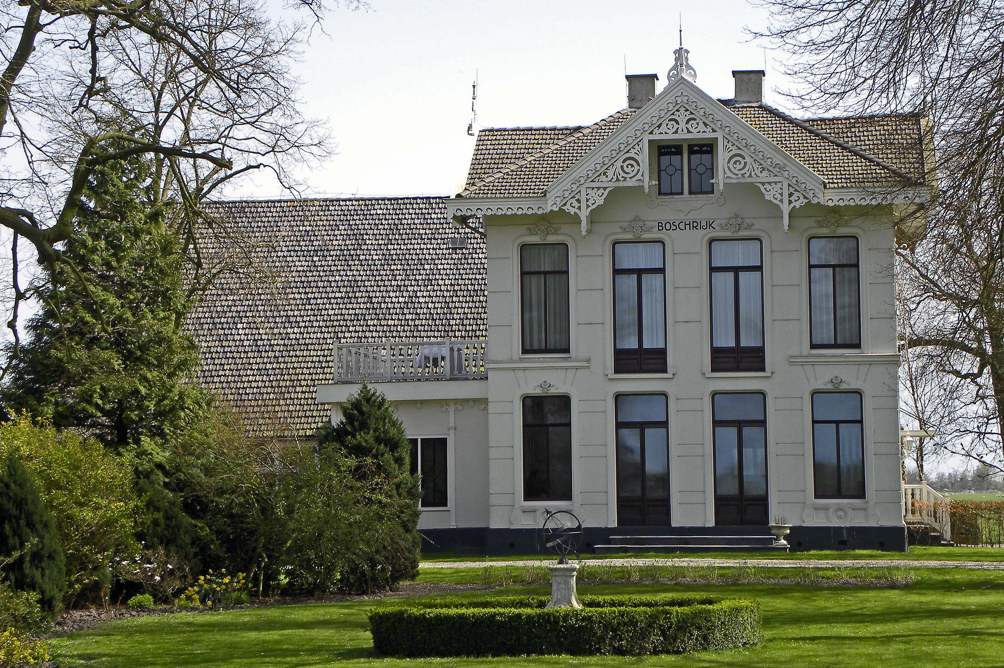 Boerderij "Boschrijk"